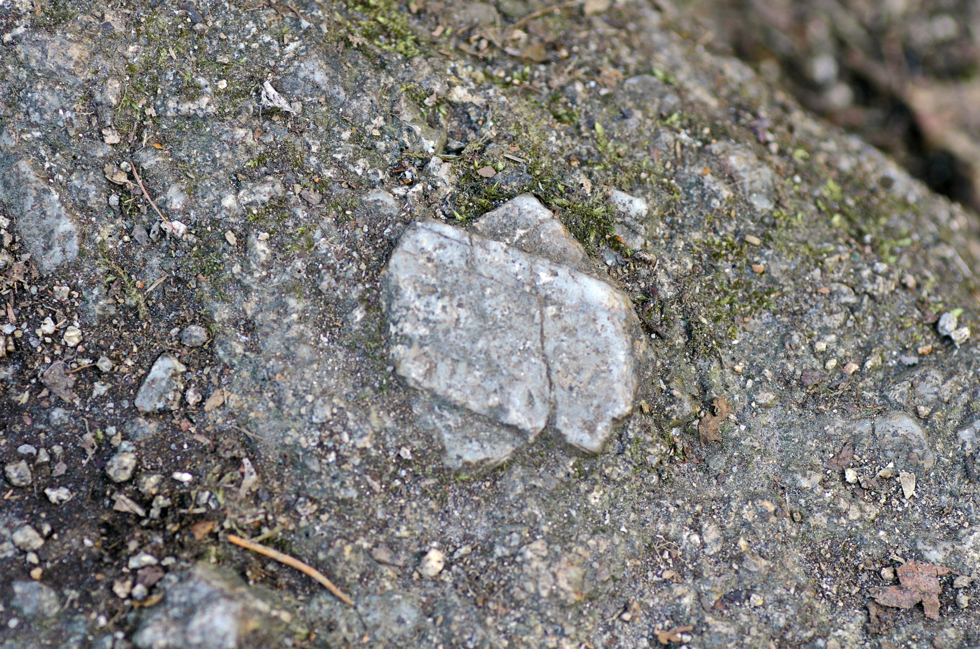 karlovarské dvojče (srostlice krystalů živce - ortoklasu) v balvanu žuly, Loket, okres Sokolov